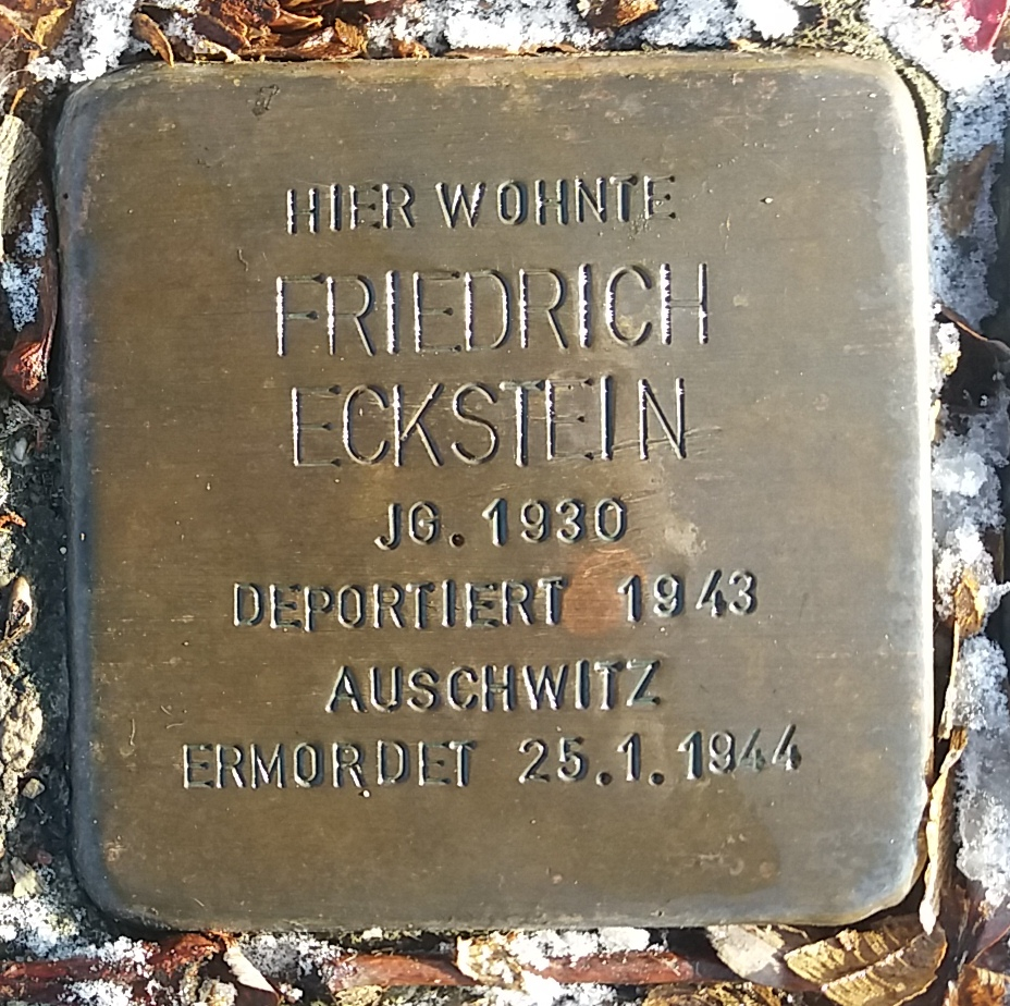 Stolperstein für Friedrich Eckstein, Mitglied der Großfamilie Eckstein, Vöhringen (Iller)